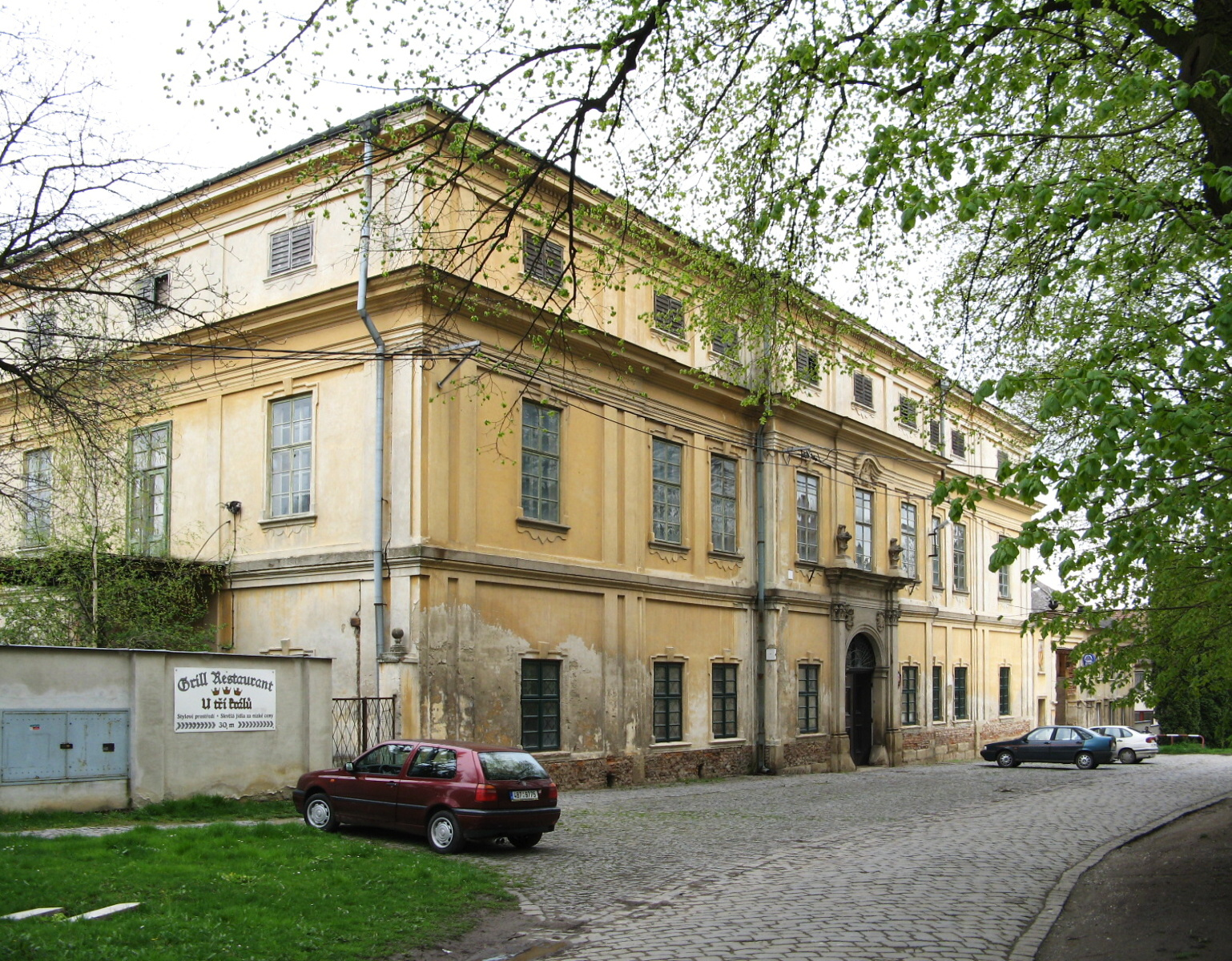 Zámek Výšovice, Výšovice 80